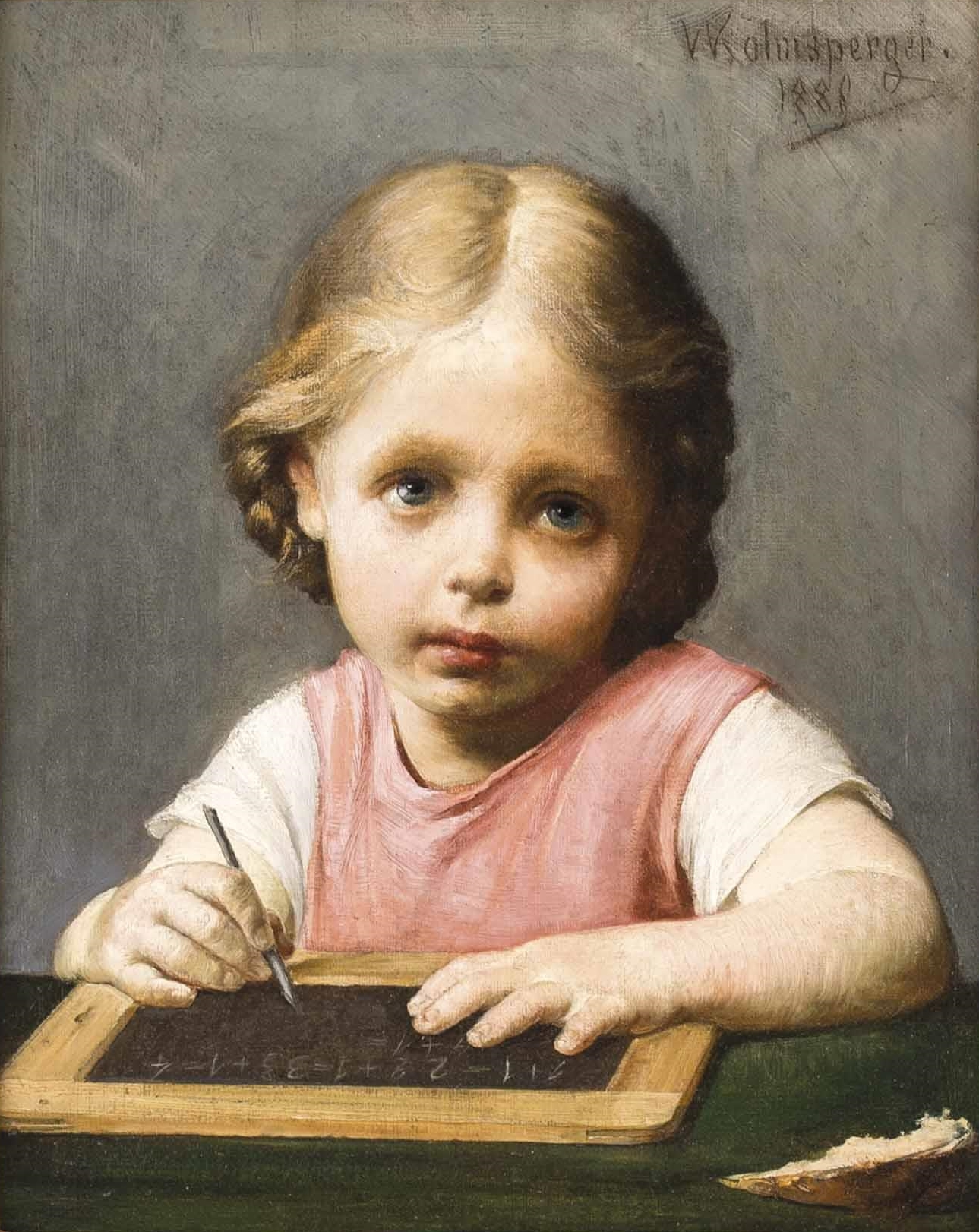 "Seine Tochter Wetti bei der Hausaufgabe des Rechnens" oben rechts signiert: W. Kolmsperger, datiert: 1880,Öl auf Leinwand, ca. 41 x 35 cm